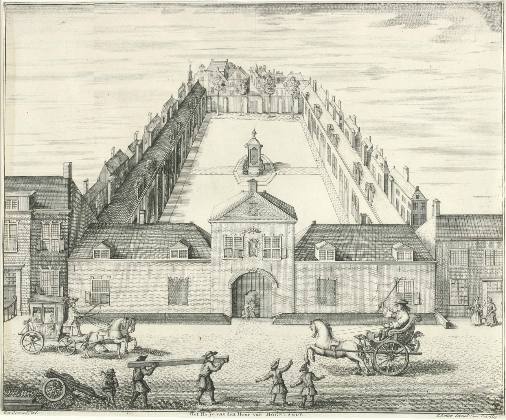 Het Hofje van Hoogelande aan de oostzijde van de Boekhorststraat, tussen de Nieuwe Molstraat en de Zuidwal (buiten beeld resp. l. en r.); aan de achtermuur van het hofje nog enkele panden aan de Rosemareinstraat (de latere Looierstraat), hoek Warmoesstraat (de latere Rozemarijnstraat).